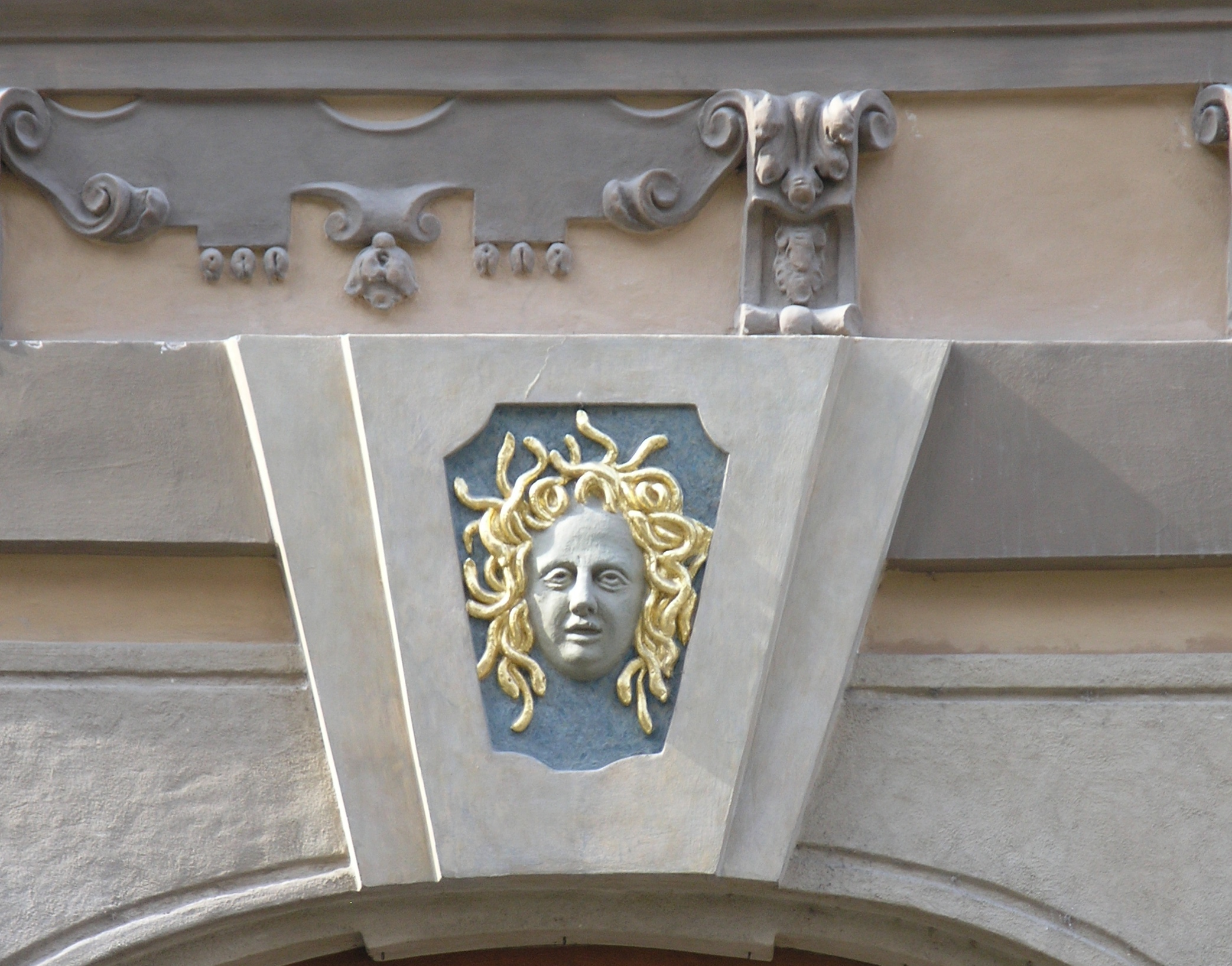 Praha, Malá Strana - reliéf hlavy medúsy na fasádě domu zvaného Valkounský (Nerudova 14)